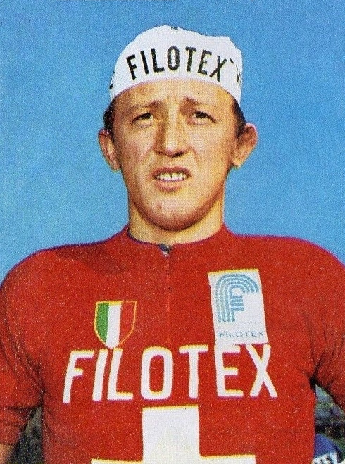 CAMPIONI dello SPORT 1973/74-Figurina n.171- FUCHS -CICLISMO-Rec